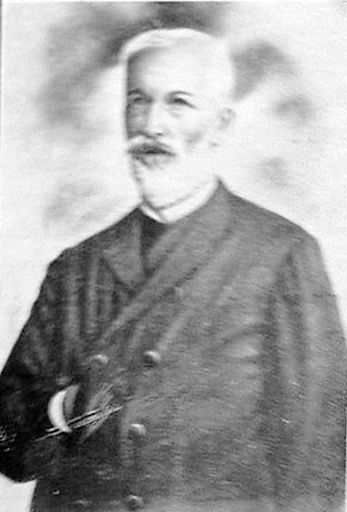 Ioan Axente Sever (1821 - 1906)